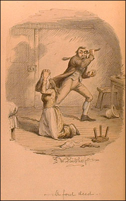 The New York Public Library, Berg Collection of English and American Literature, Illustrazione di F.W. Pailthorpe datata 1886 raffigurante l'uccisione di Nancy da parte di Bill Sikes nel romanzo Le avventure di Oliver Twist di Charles Dickens